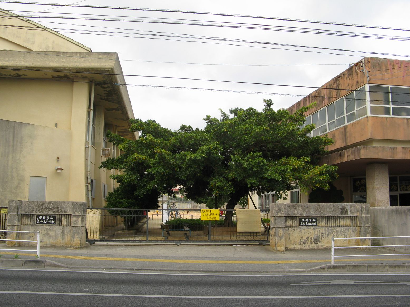 那覇市立真和志小学校